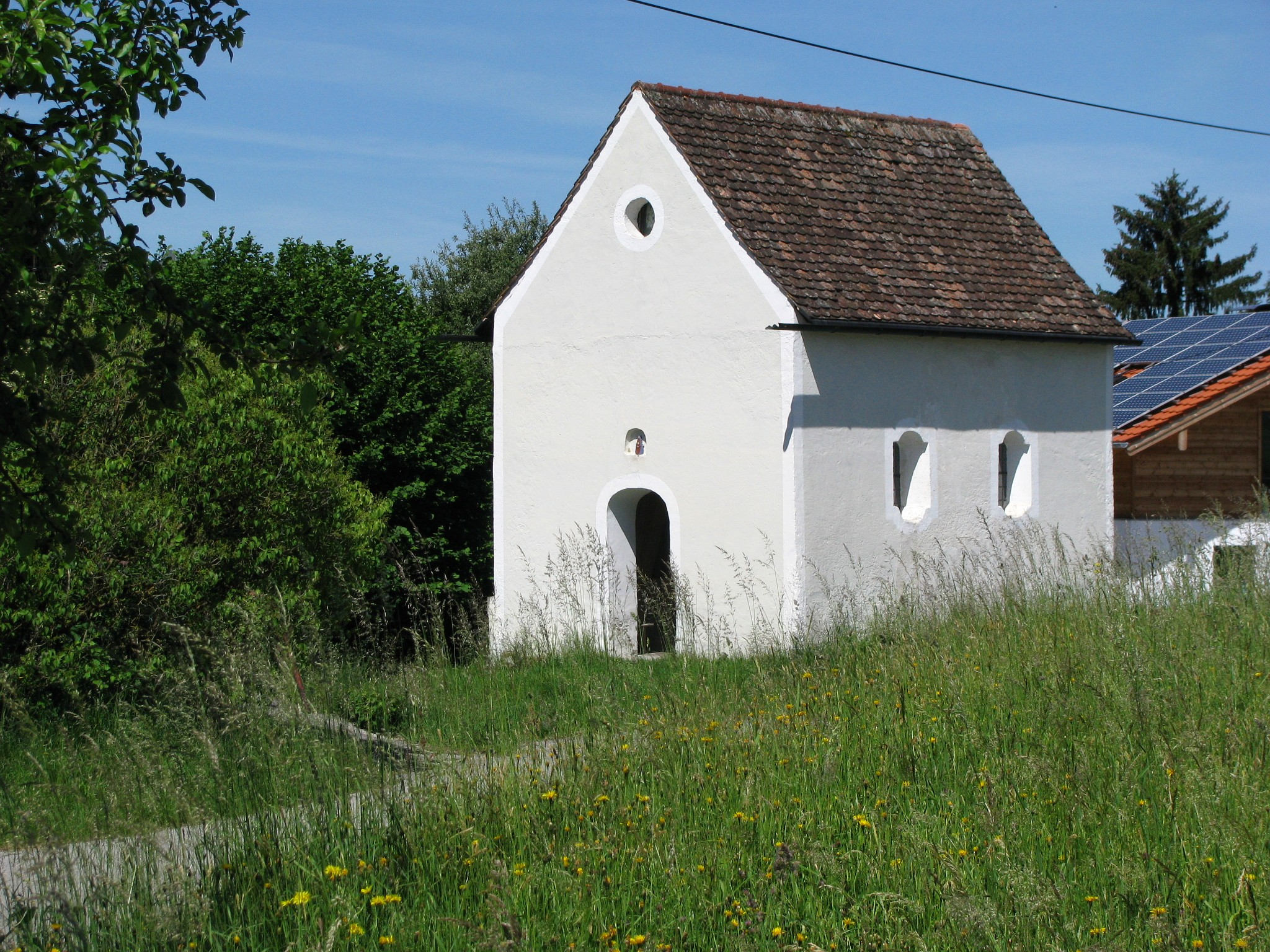 Kath. Weilerkapelle in Sachsenhausen, Gemeinde Egling, 2. Hälfte 17. Jh